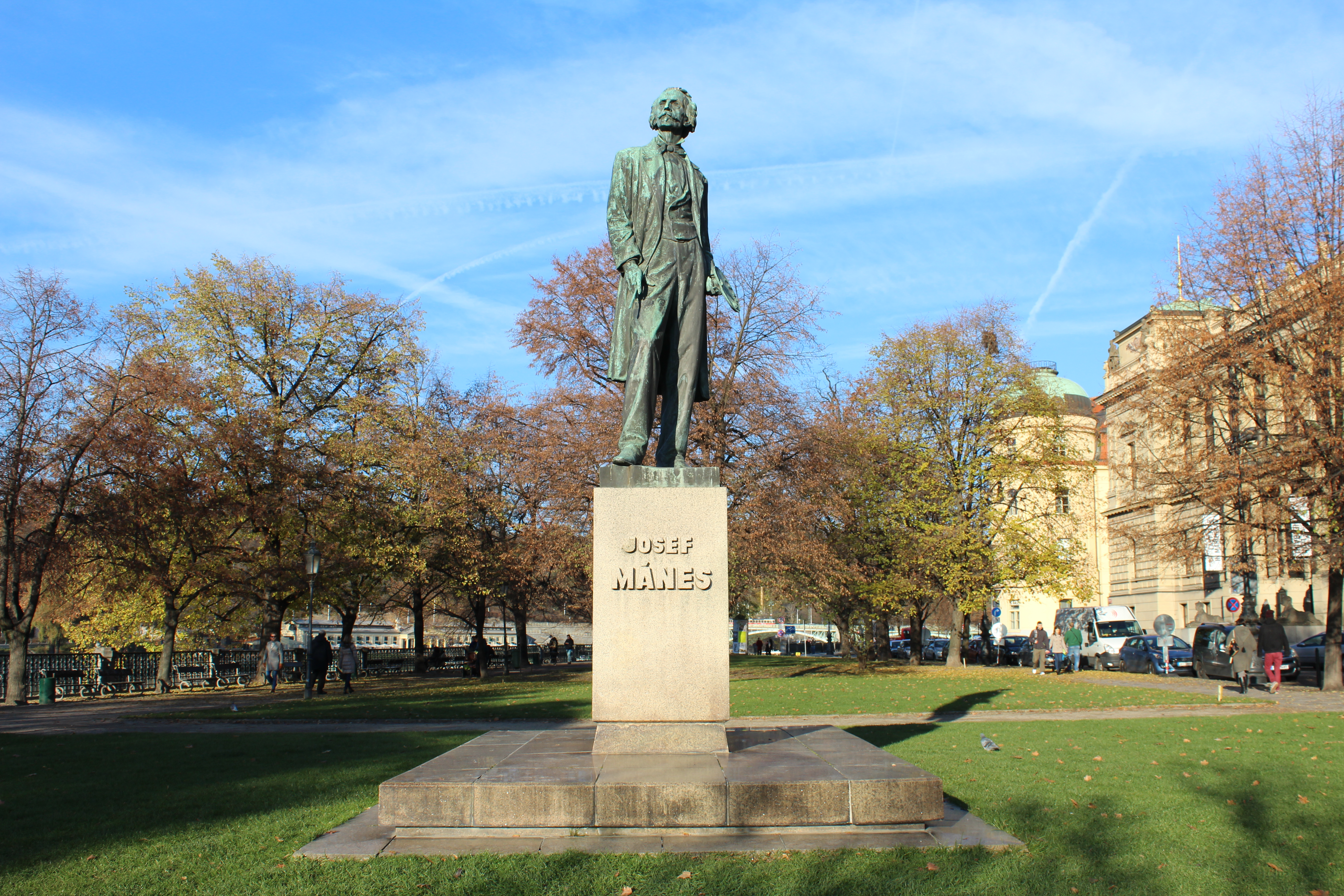 Statue en l'honneur de Josef Mánes à Prague.